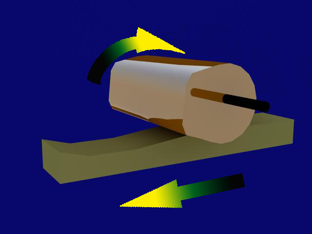 Dibujo de forjado con rodillo